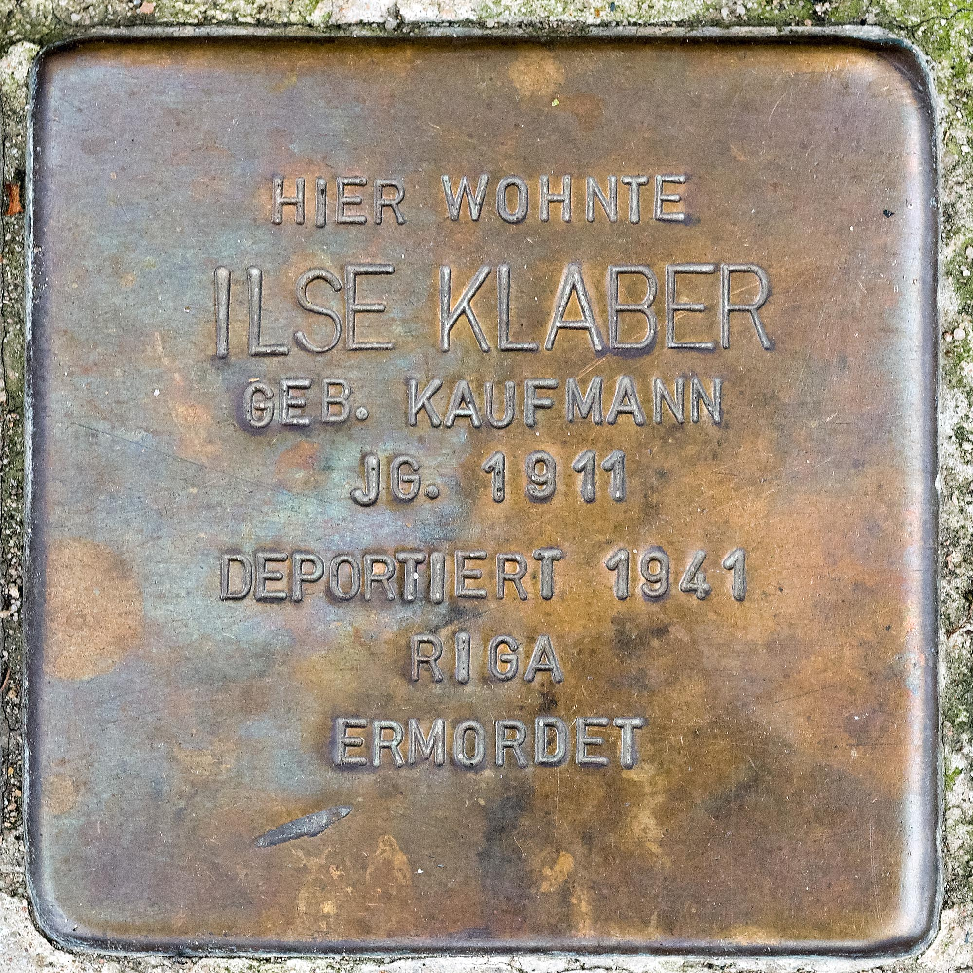 Stolperstein Klaber, Ilse